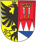 Česky: znak vojenského újezdu Libavá